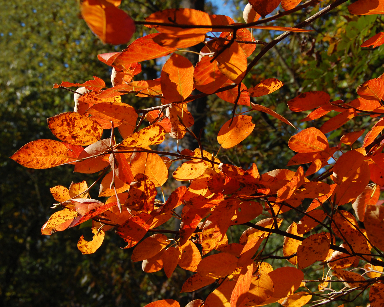 Herfstkleuren